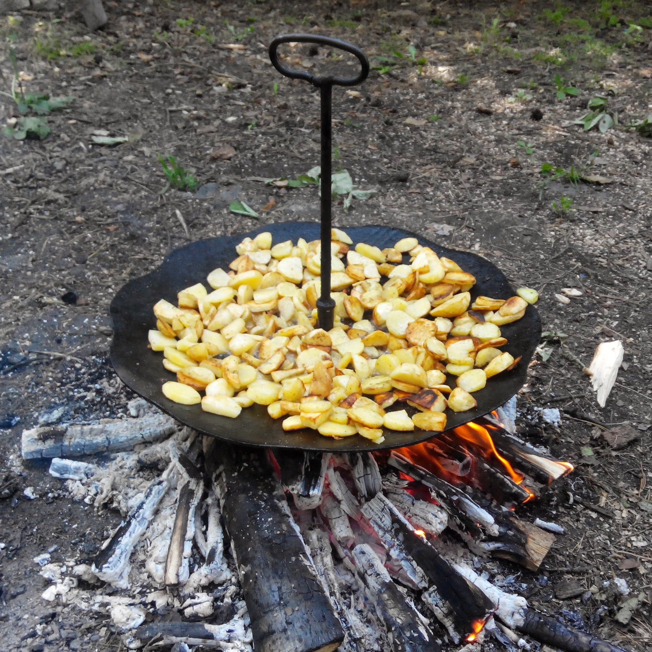 Смажена картопля на дисковій пательні (Диск з борони)